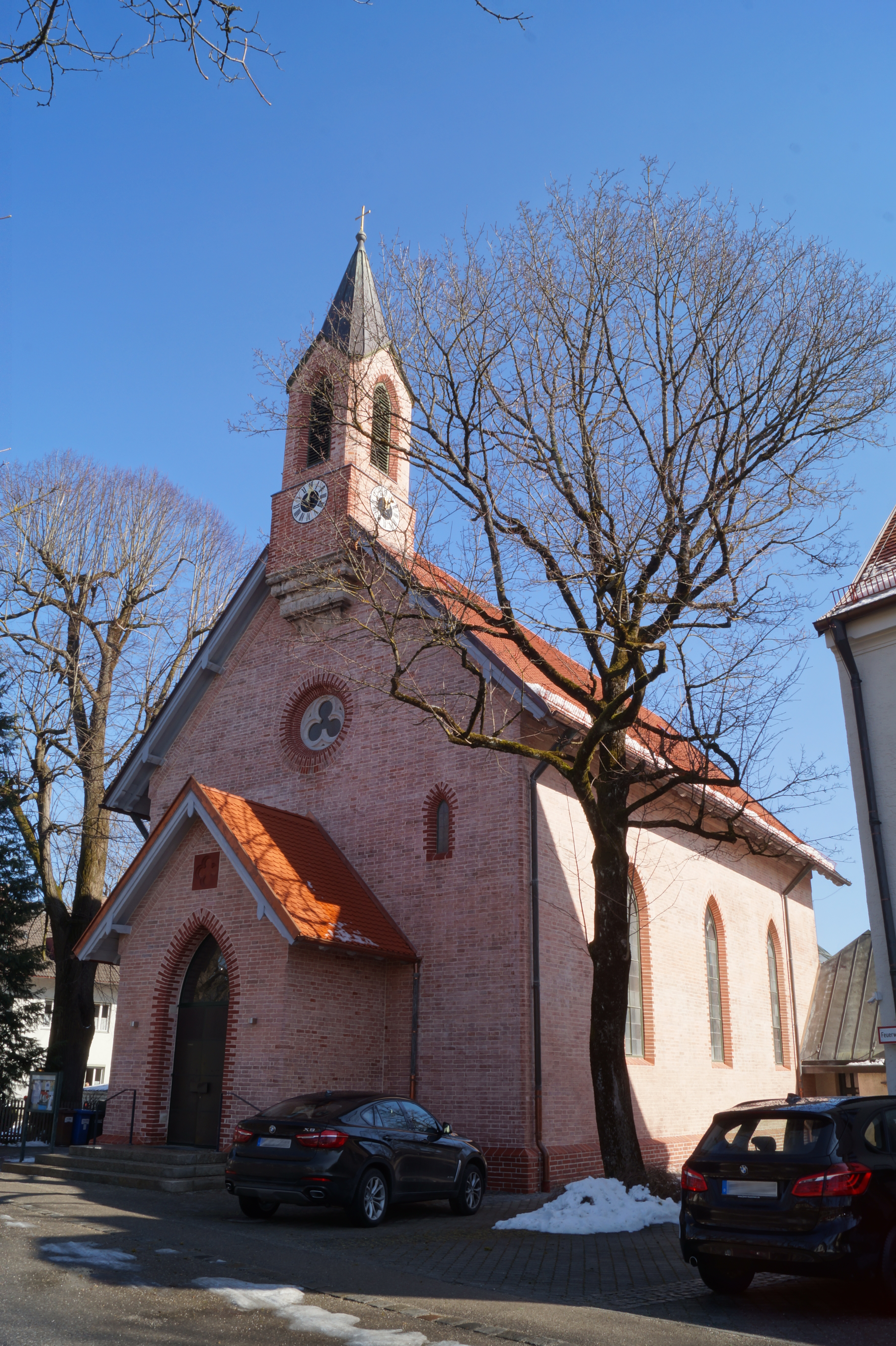 Kirche St. Paul in München, Ramersdorf Perlach, Sebastian-Bauer-Staße 21. Aufgenommen am 04.03.2018. Das Bild zeigt die Veränderungen der Kirche nach der Renovierung in den Jahren 2016/2017.